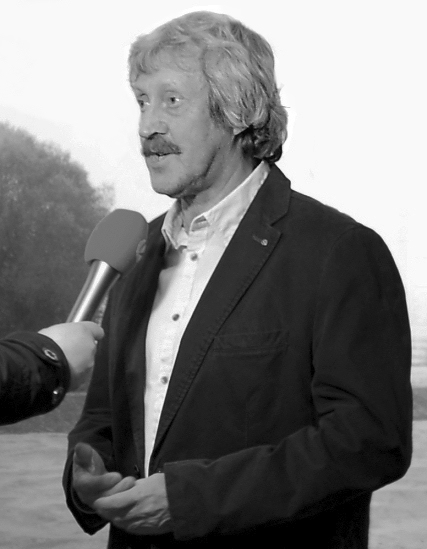 Der Leiter der Stadt- und Kreisarchäologie Osnabrück Bodo Zehm bei einem Interview zum Kupferschatz von Osnabrück